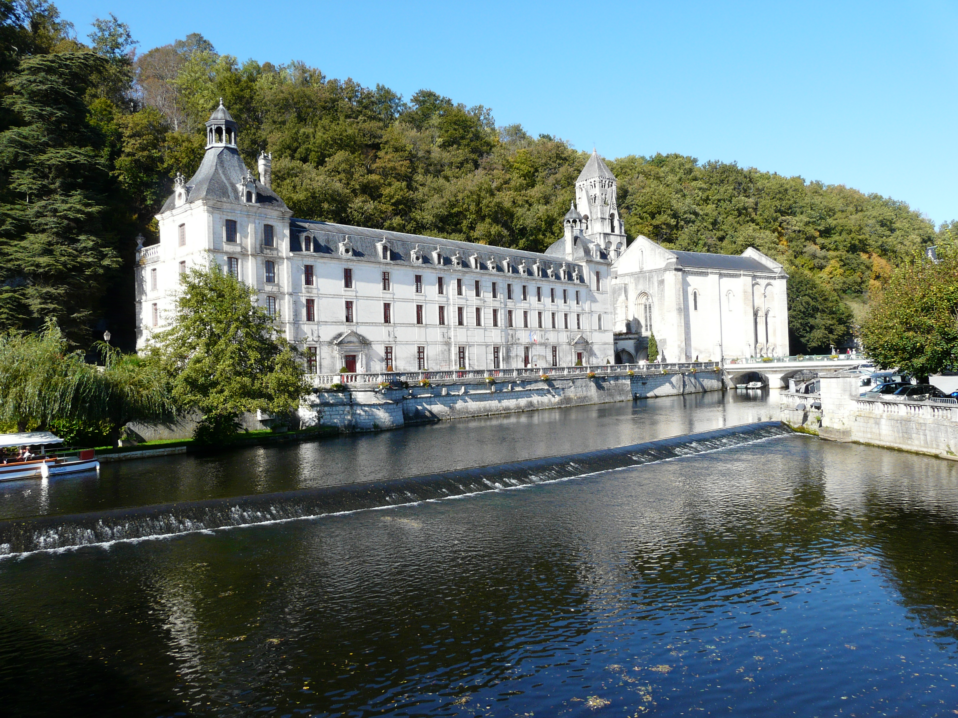 Abbaye Saint-Pierre (à gauche les bâtiments conventuels, à droite l'église abbatiale et au centre le clocher campanile), Brantôme, dordogne, France